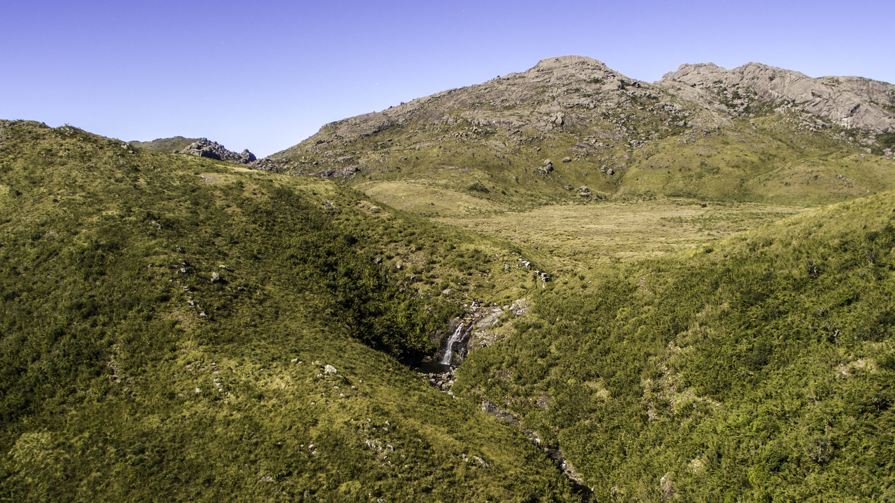 Uma vista panorâmica do Vale do Aiuruoca, com destaque para a Cachoeira do Aiuruoca em primeiro plano e ao fundo, a formação dos Ovos da Galinha à esquerda e a Pedra do Sino do Itatiaia à direita.